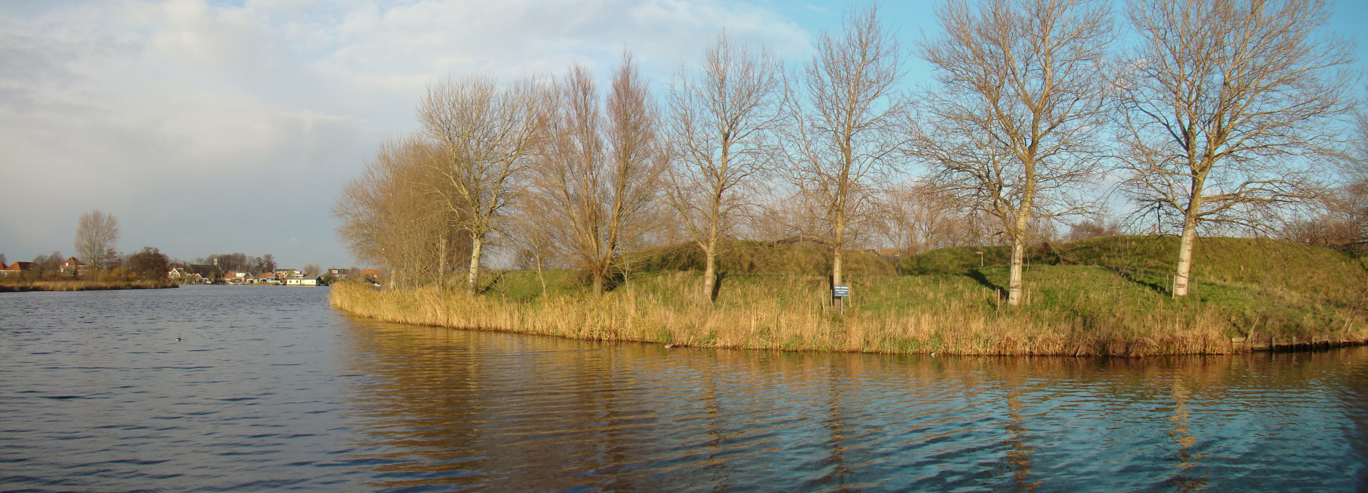 Fort bij de Liebrug, Haarlemmerliede